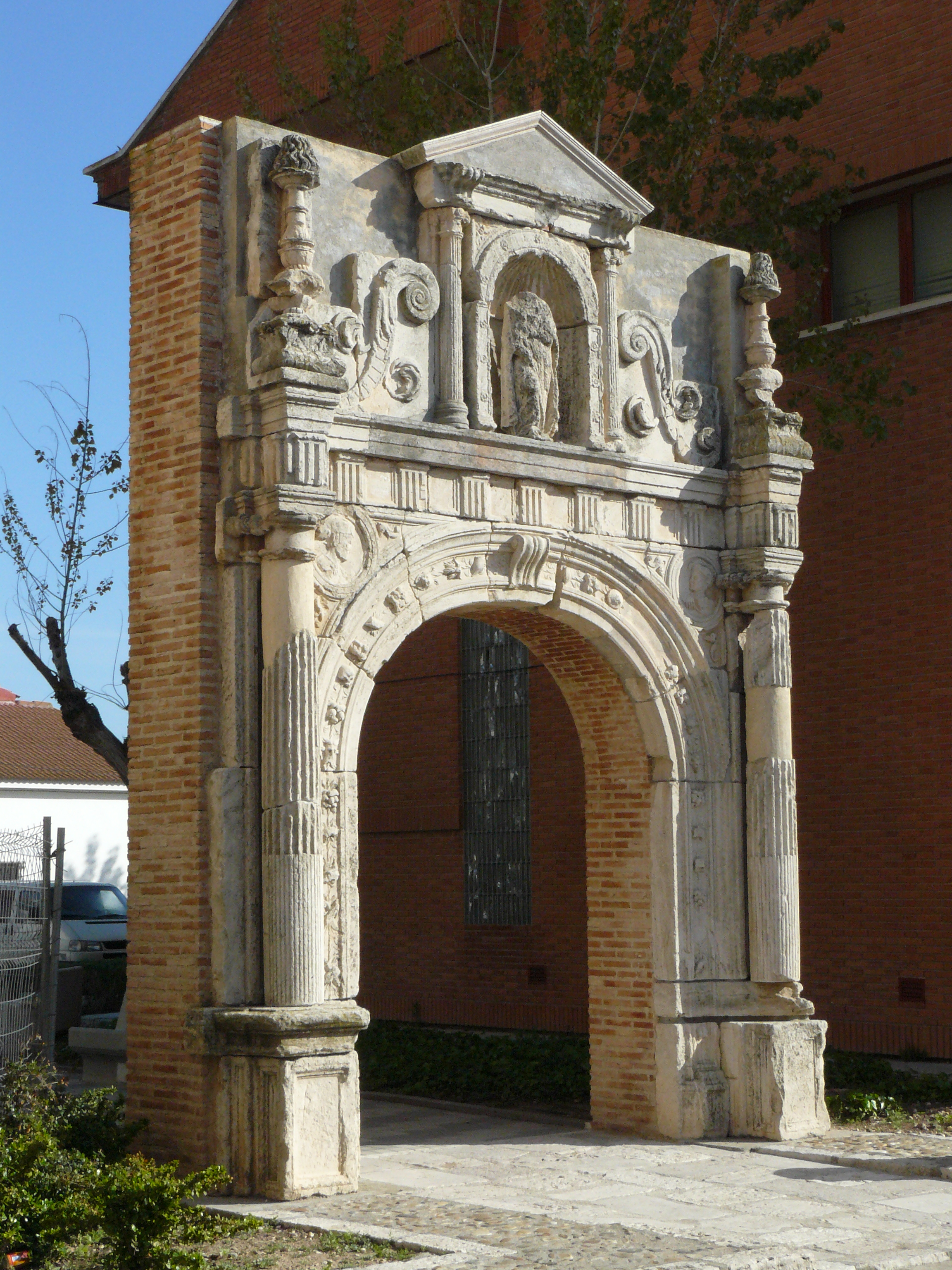 Puerta de la iglesia de San Martín, Ocaña.